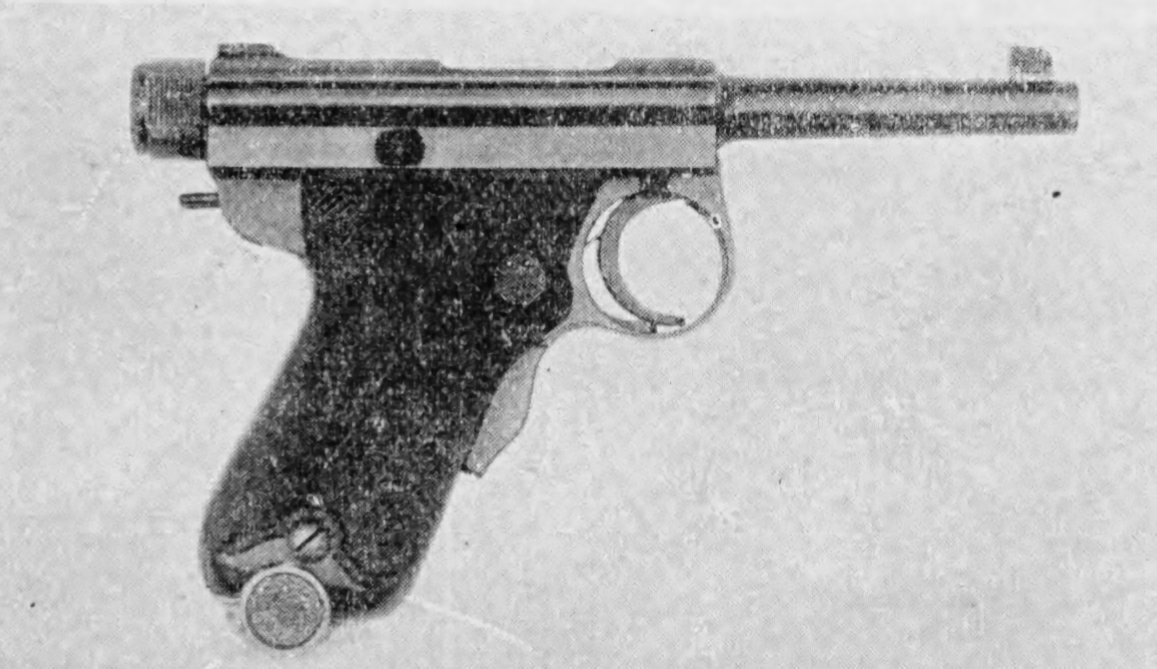 南部式小型自動拳銃。主に将校の軍装品として装備された。